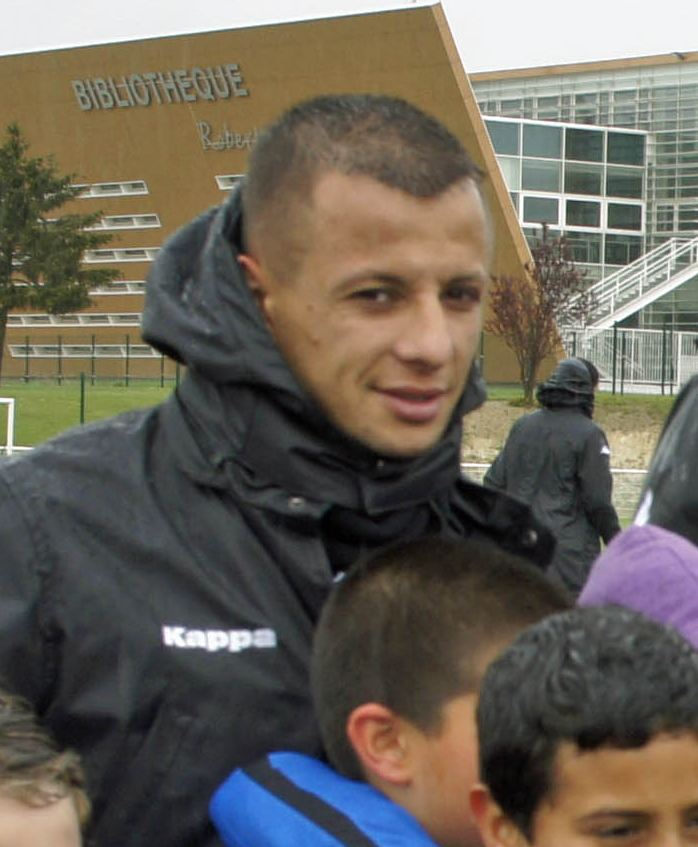 portrait de Kamel Ghilas